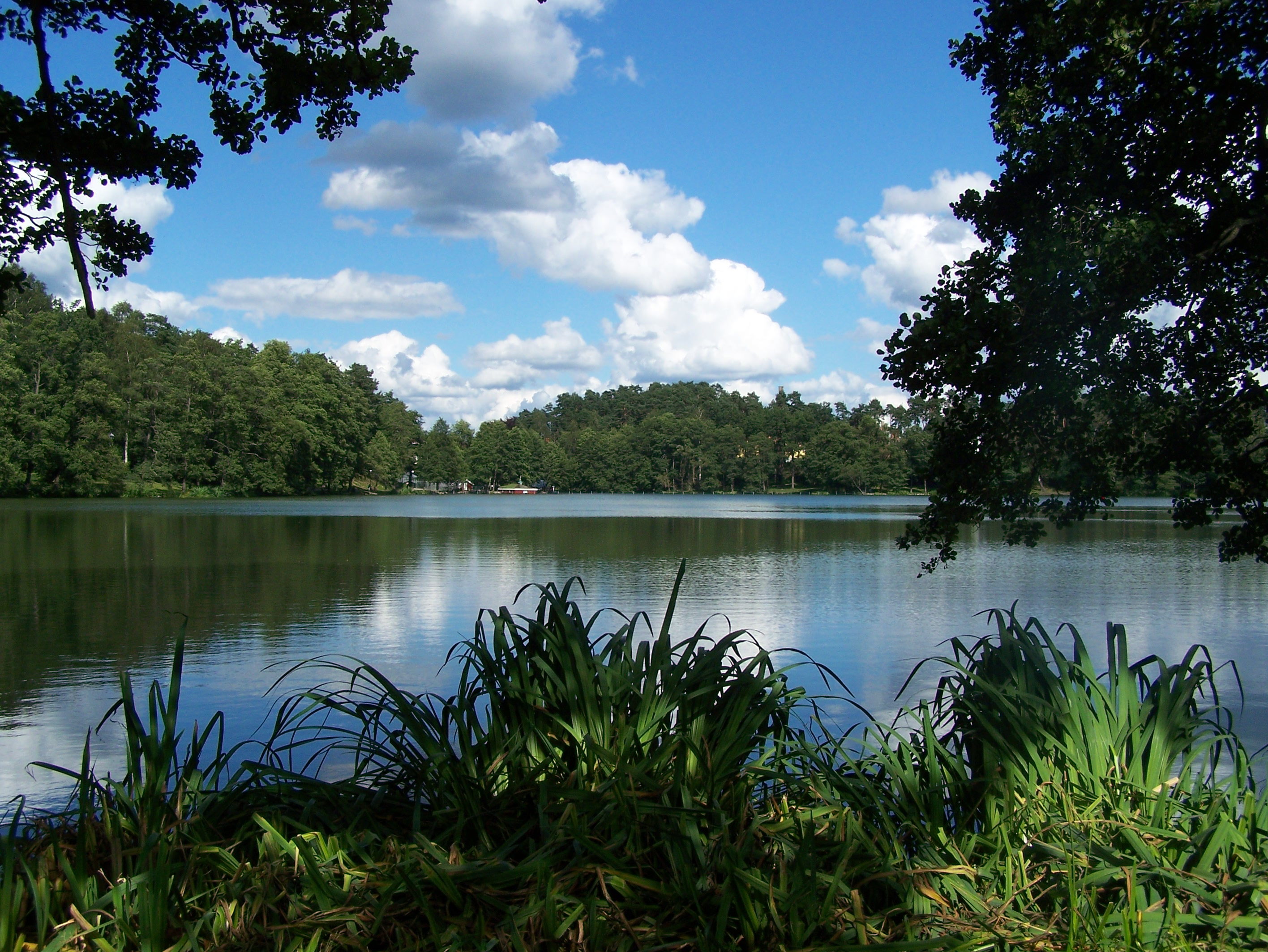 Ramnasjön, Borås